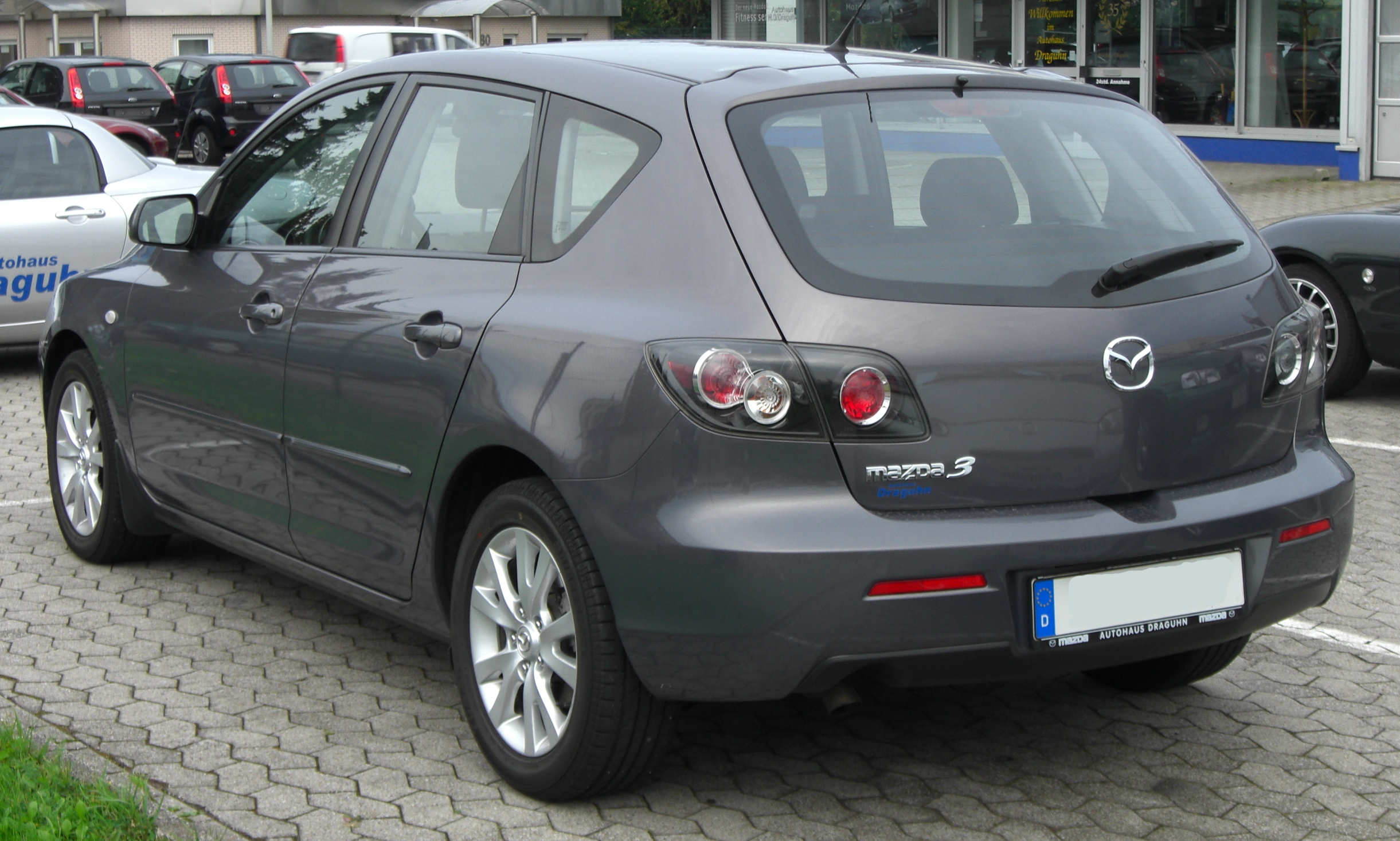 Mazda 3